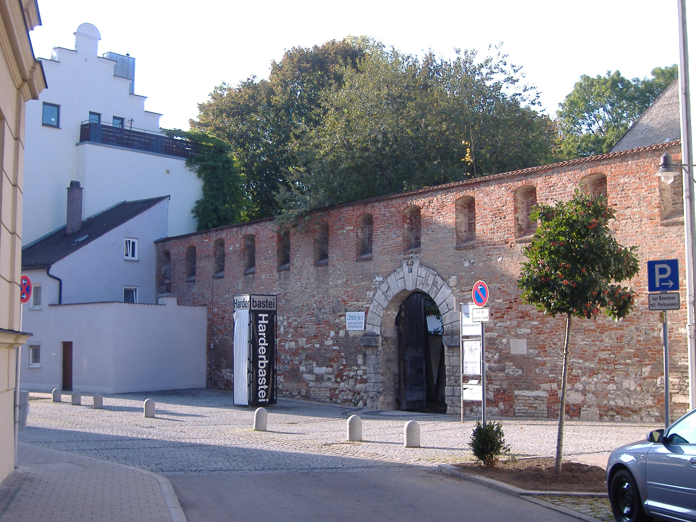 Die Harder-Bastei in Ingolstadt.